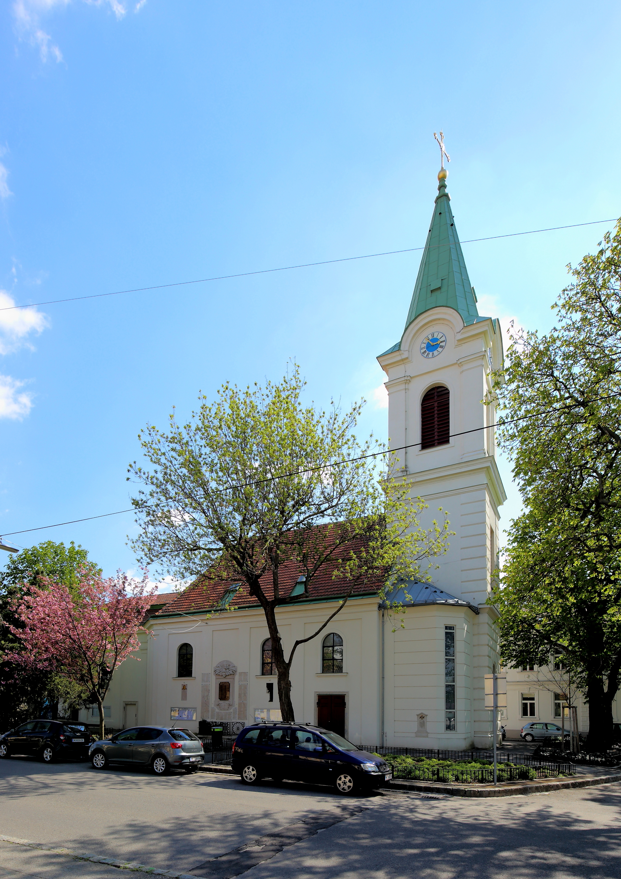 Die Maria-Loretto-Kirche in Jedlesee, ein Ortsteil im 21. Wiener Gemeindebezirk Floridsdorf. 1779 wurde die Kapelle zur Kirche ausgebaut, womit die Kapelle zum Altarraum der Kirche wurde. 1877 erfolgte eine weitere Erweiterung und 1885 wurde der Turm errichtet.